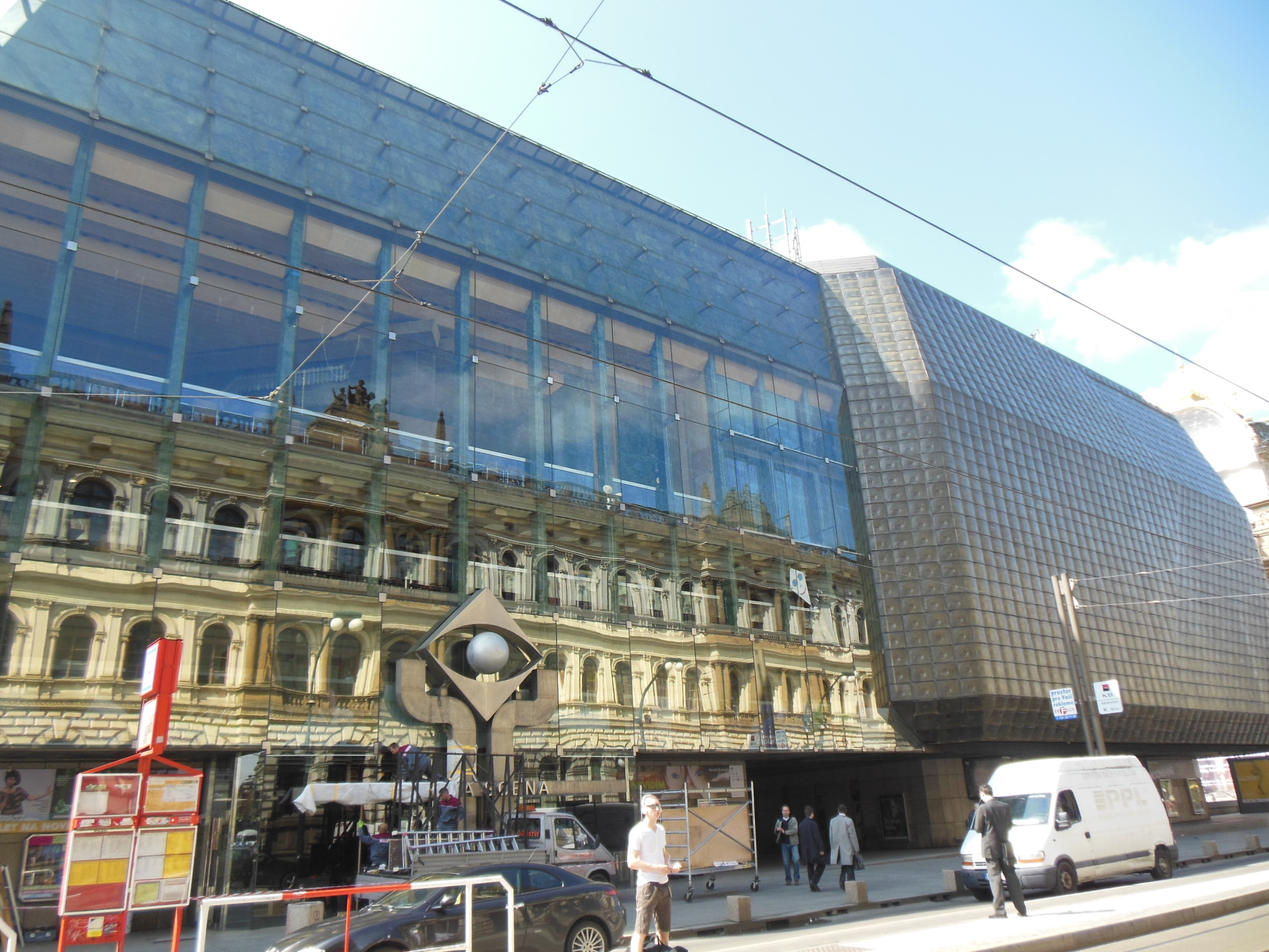 Nová scéna u Národního divadla v ulici Národní v Praze na Novém Městě.